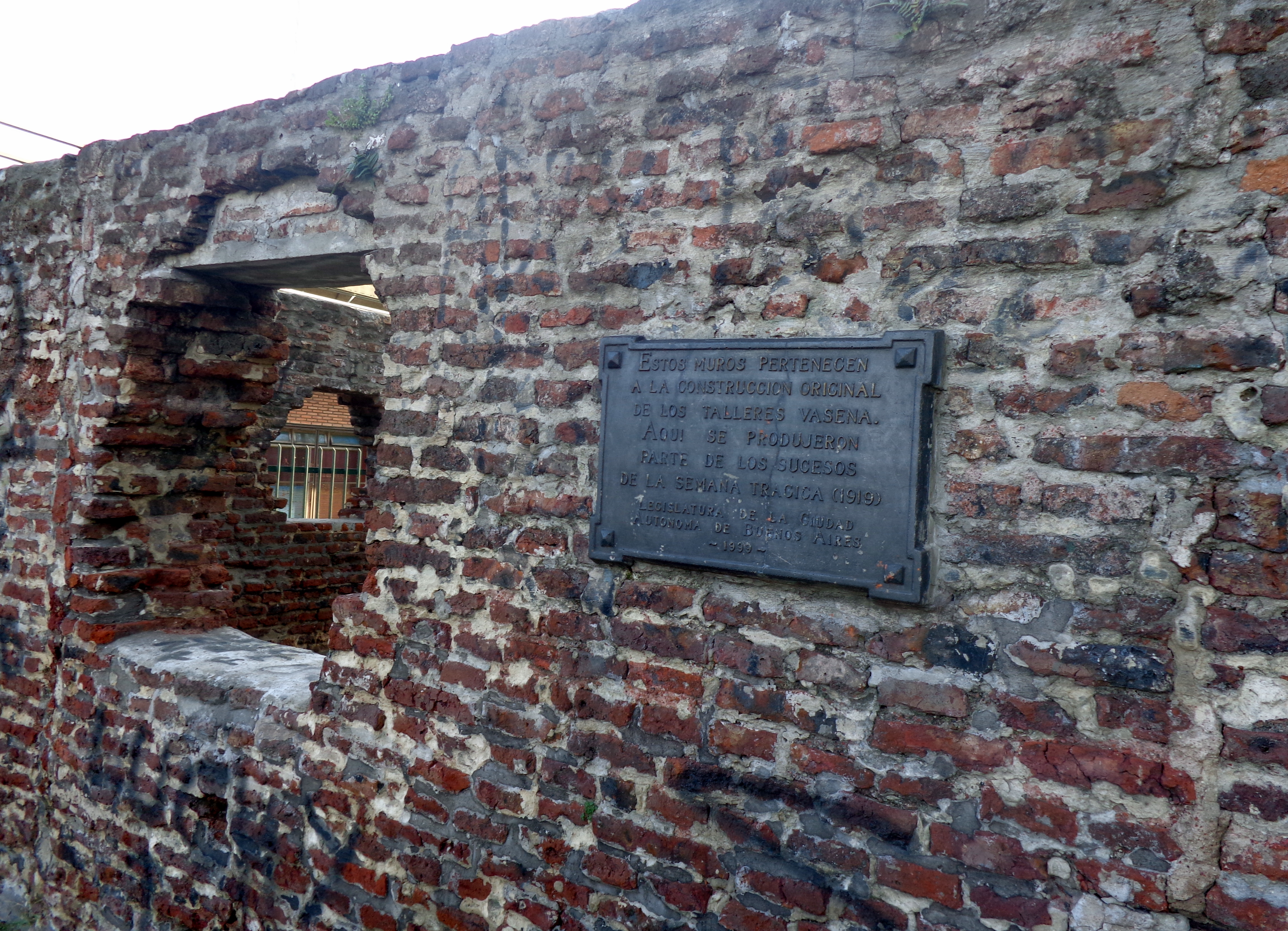 Muros que quedaron de los talleres Vasena, como recuerdo de la Semana Trágica de 1919, en la Plaza Martín Fierro, Barrio de San Cristobal, Buenos Aires, Argentina. Los mismos corresponden al establecimiento que estaba ubicado en la manzana delimitada por las calles Cochabamba, General Urquiza, Oruro, Constitución y La Rioja, frente al gran edificio de la administración, ubicado en la manzana ubicada del otro lado de Cochabamba.